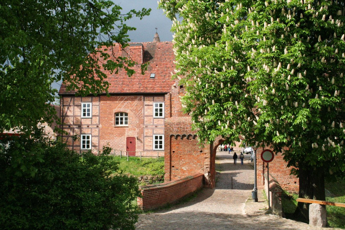 Unteres Tor (Haupttor) der Burg Stargard